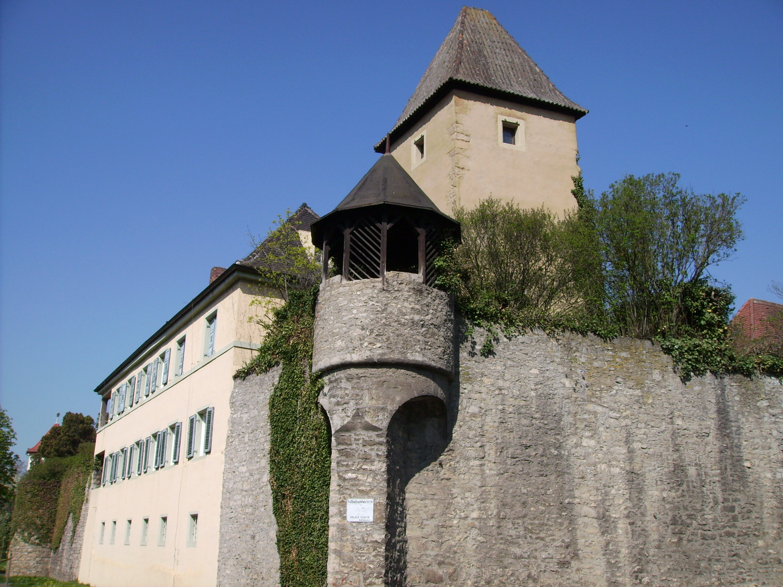 Ochsenfurt. Pulverturm, ehemals Munitionslager und Gefängnis. Davor Befestigung mit einem kleinen Rundturm.